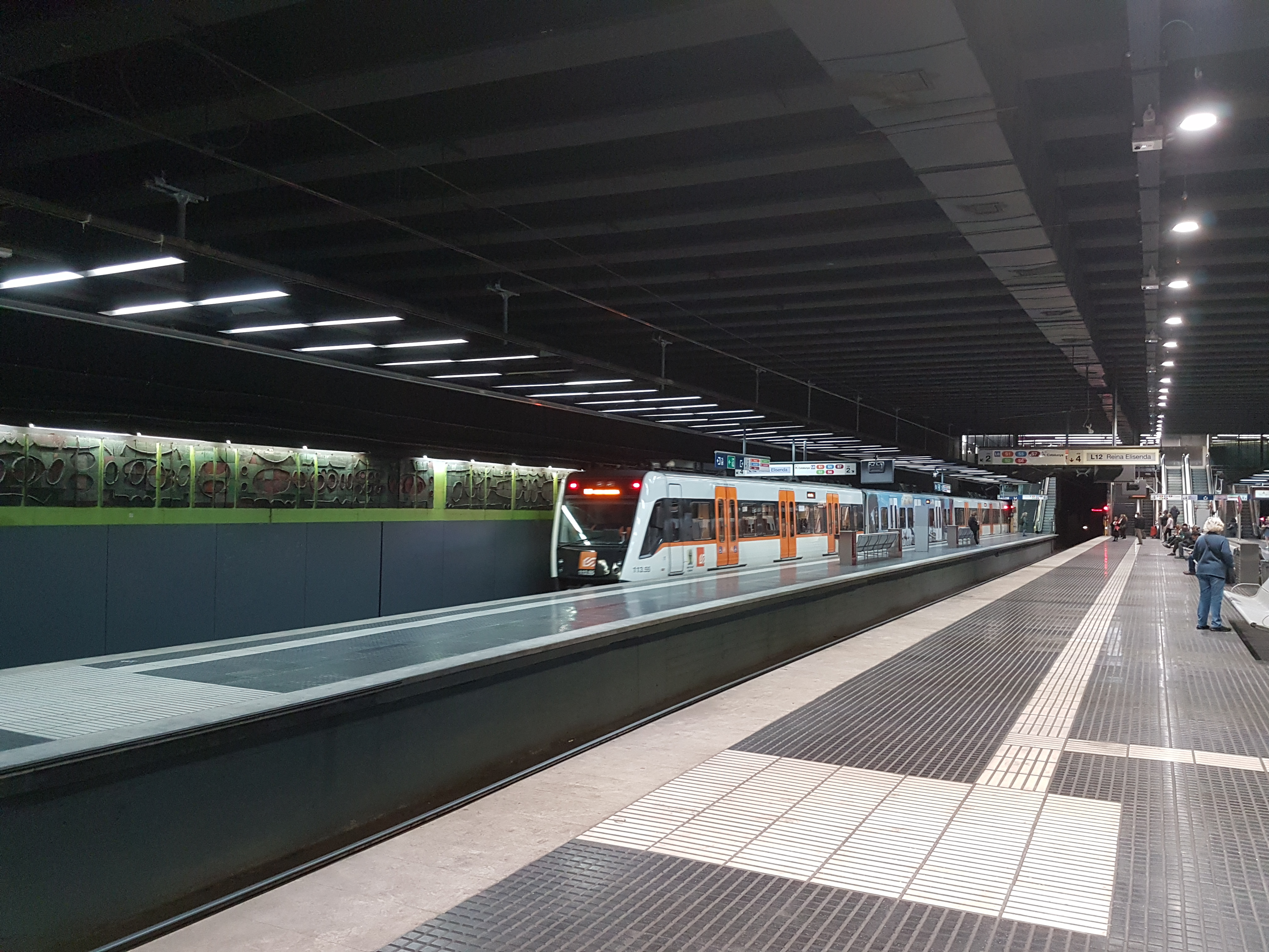 Tren de la sèrie 113 a la via 4 amb servei L12 Reina Elisenda deixa l'estació